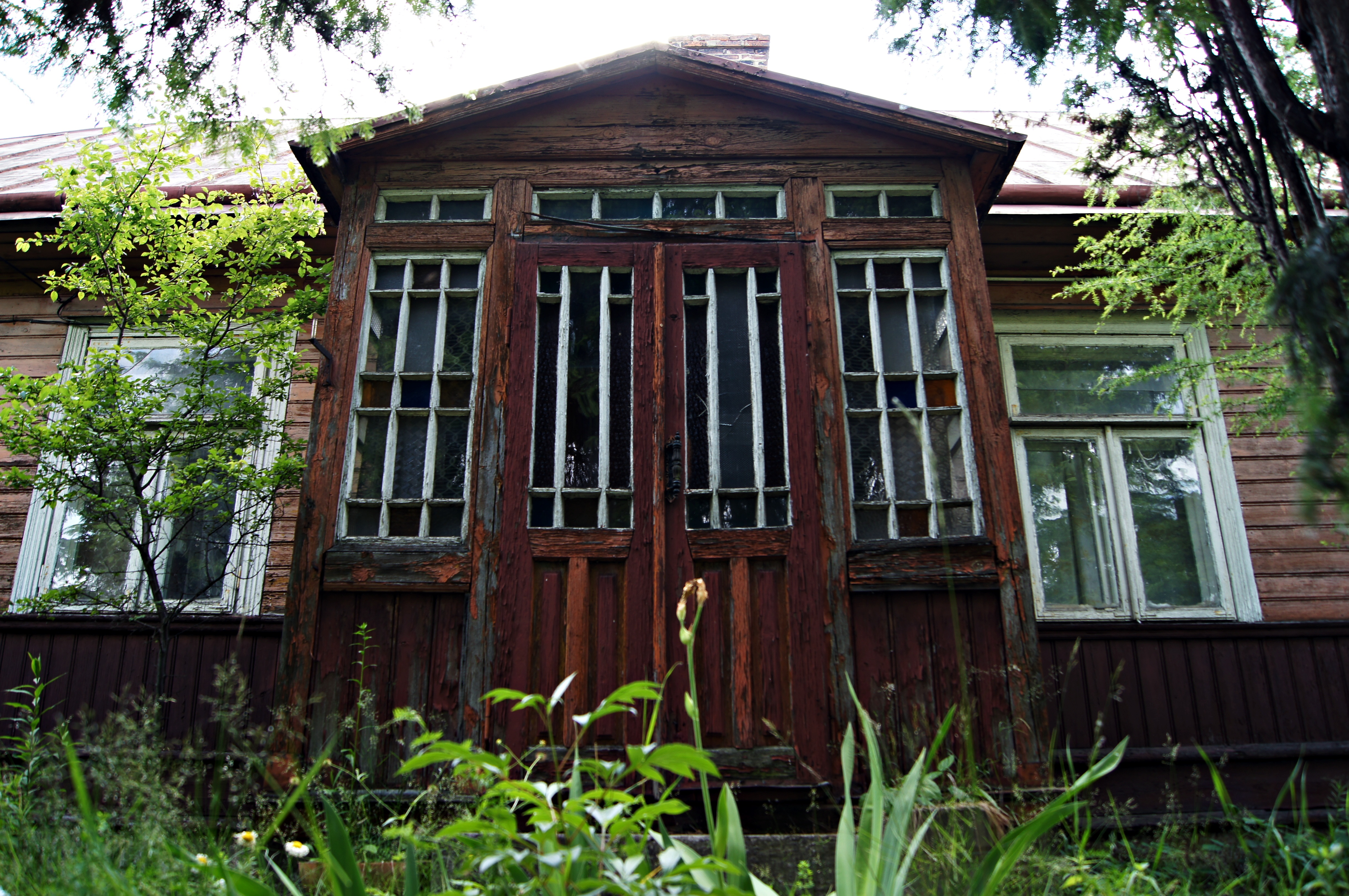 Dom Mariana Piekarskiego przy ulicy Podhorskiego 5 (dawniej Kolejowa 8/1) w Suwałkach.